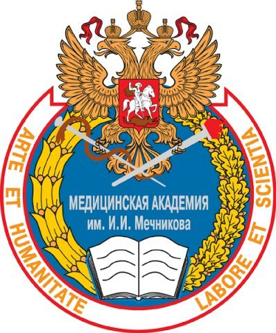 Санкт-Петербургская государственная медицинская академия имени И. И. Мечникова